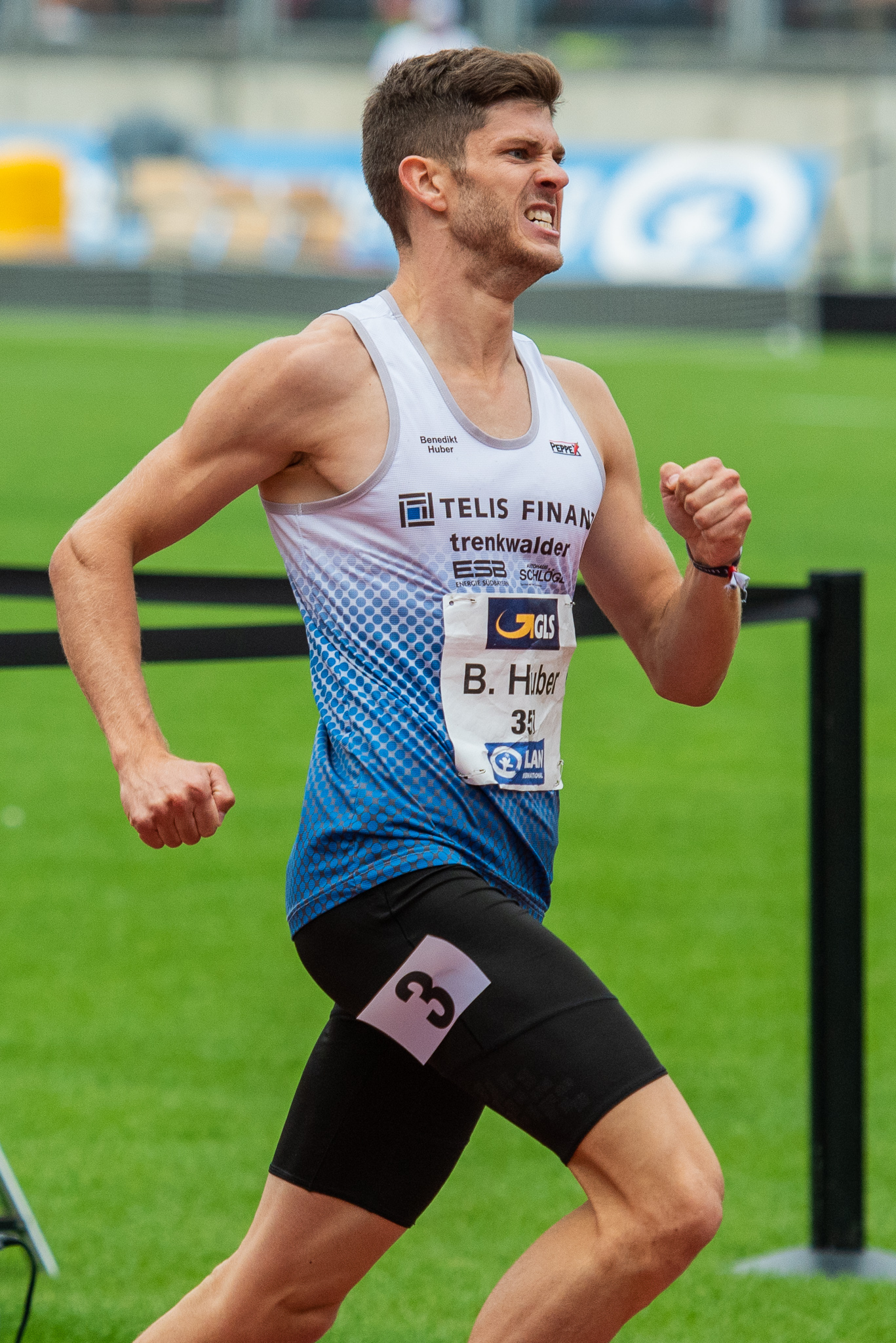 800-Meter-Lauf,Benedikt Huber,DLV,Deutsche Leichtathletik Meisterschaften 2018,Deutscher Leichtathletik-Verband,LG Telis Finanz Regensburg,Max-Morlock-Stadion